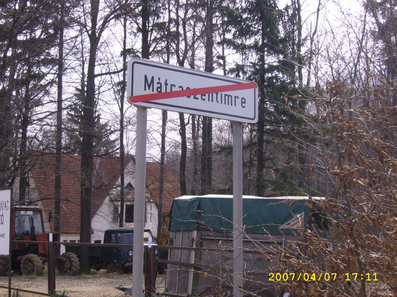 Mátraszentimre végét jelző tábla